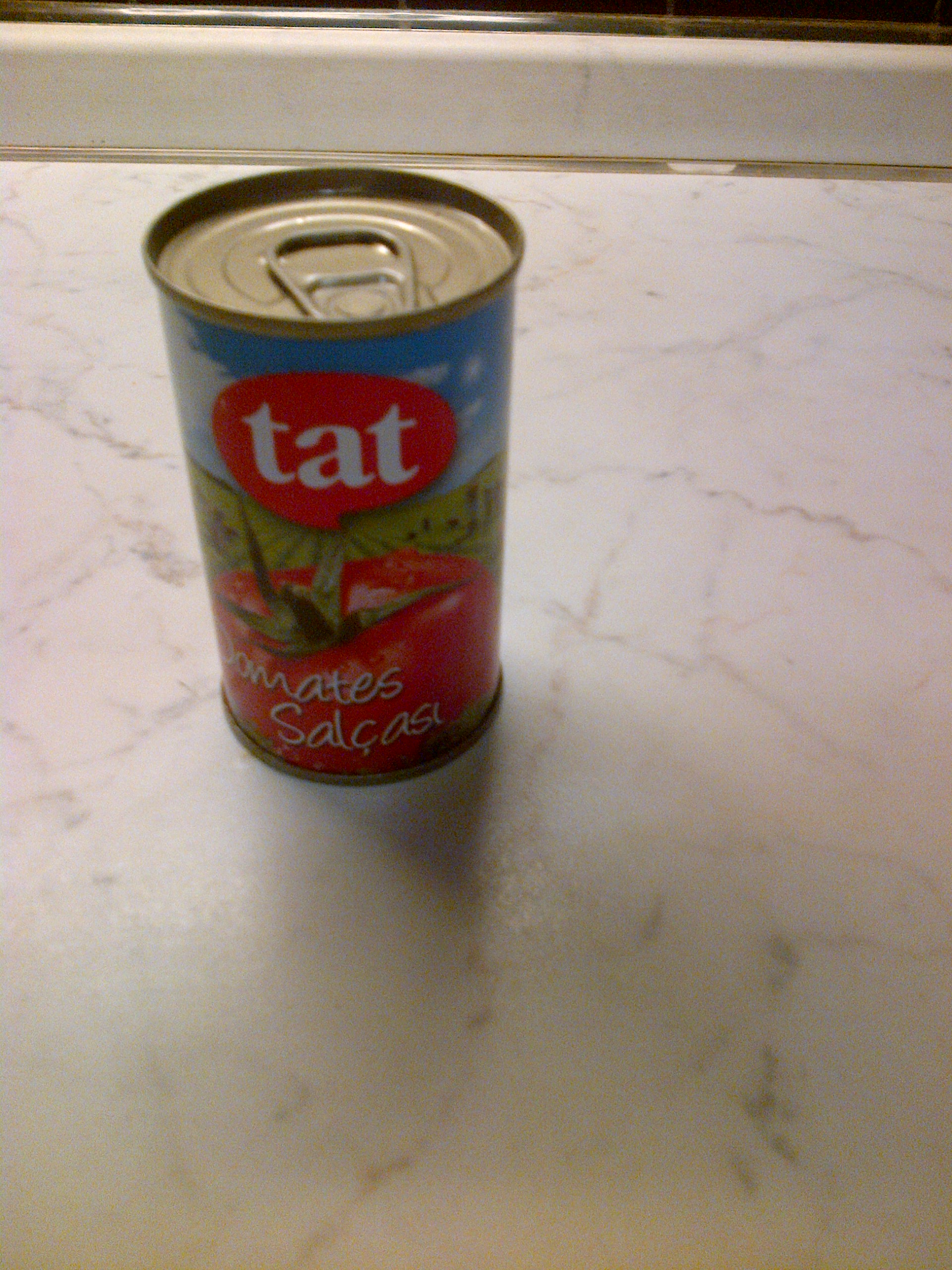 Pasta de tomate turco ("salça")